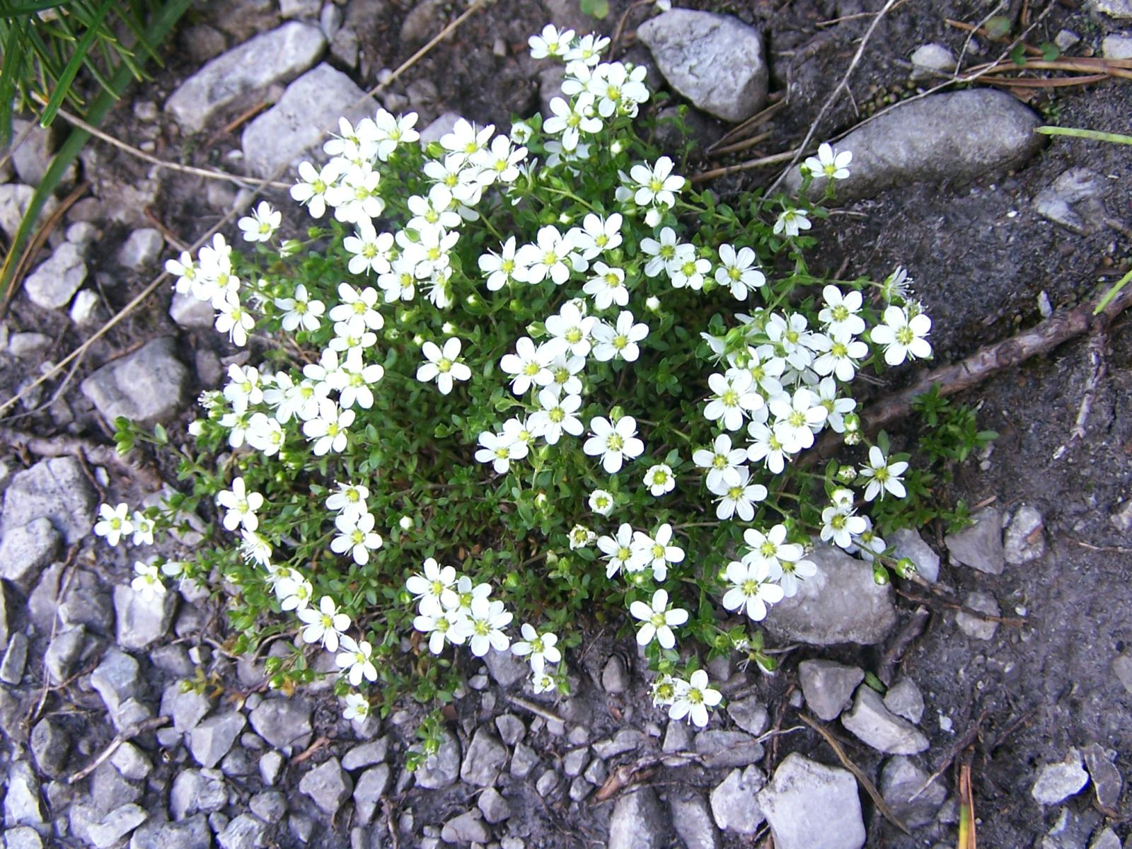 Arenaria ciliata (pl. piaskowiec orzęsiony), habitat: Tatra Mountains, Boczań